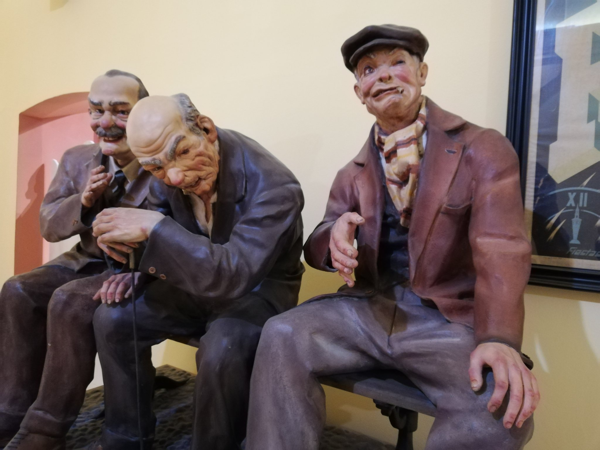 Ninot indultat de l'any 1960 obra de Julián Puche plantat a la Falla de la comissió Plaça del Pilar amb el lema "La vida és somni"